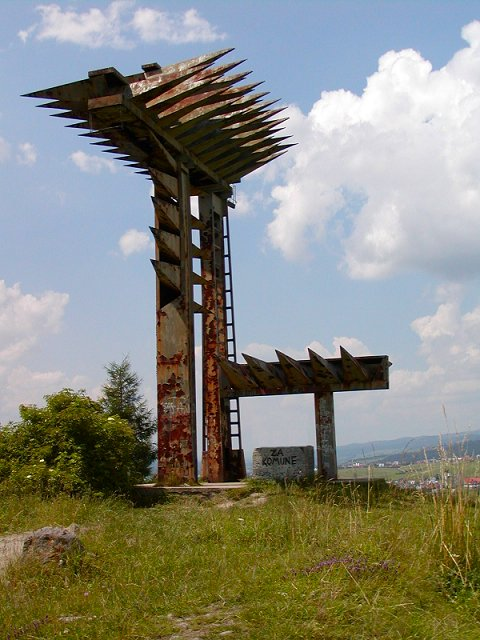 Pomnik "Poległym o utrwalenie władzy ludowej na Podhalu" na przełęczy Snozka koło Czorsztyna - Władysław Hasior 1966 autor: Maciej Dembiniok 2004